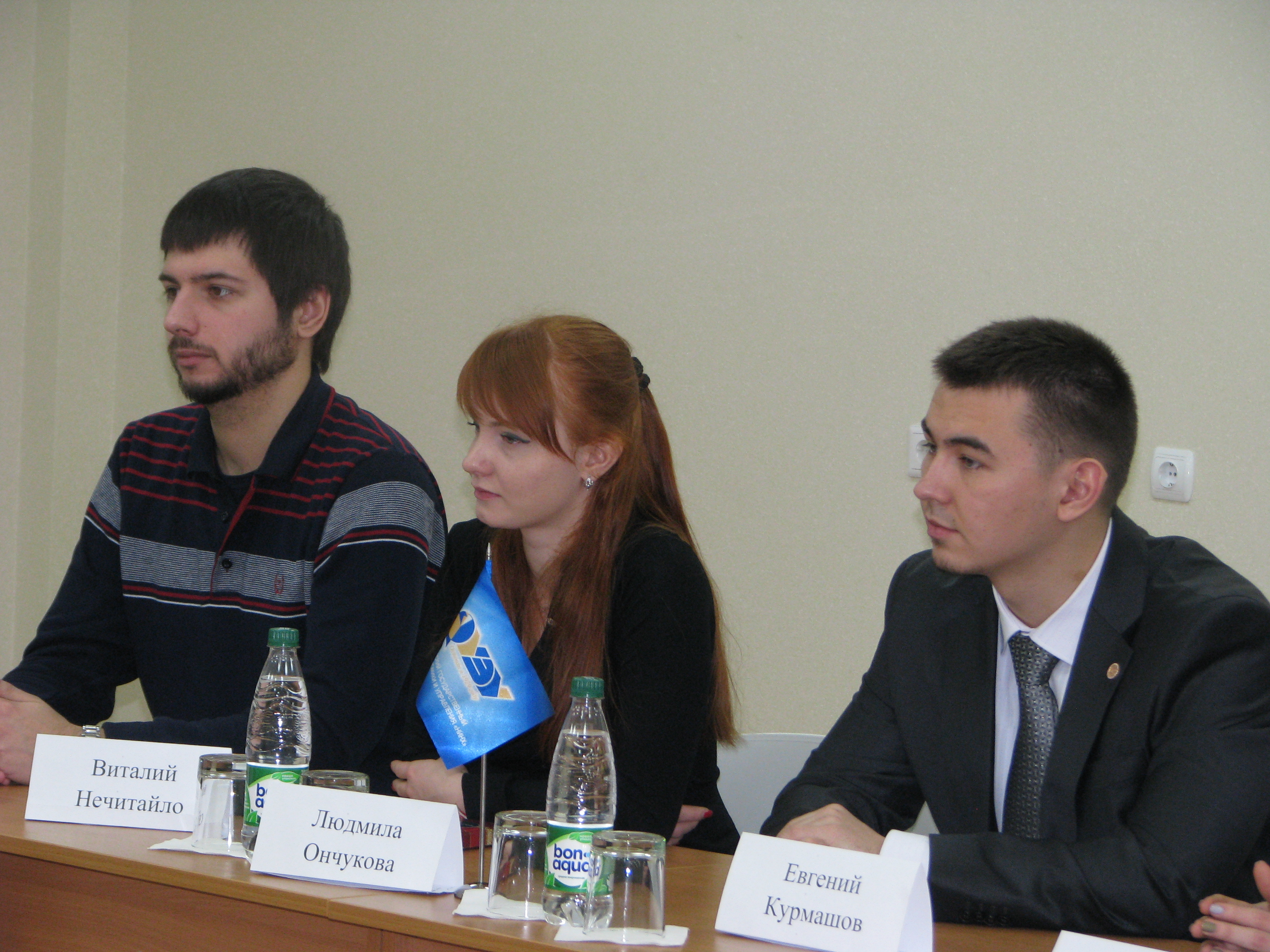 Круглый стол, посвященный работе студенческого актива НГУЭУ